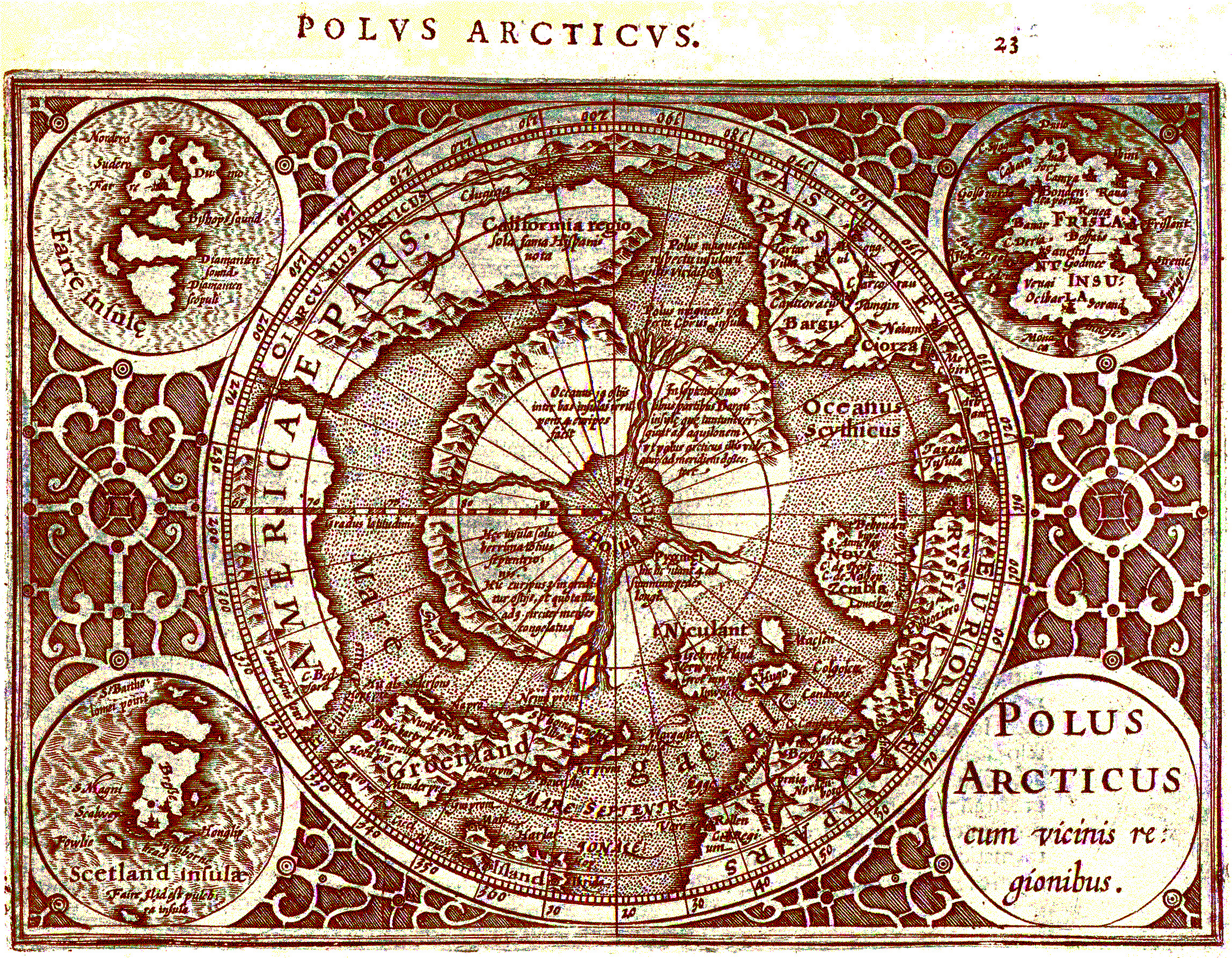 Noordpoolkaart uit de Mercator-Hondiusatlas van 1610. Ter beschrijving van deze kaart vindt men in de Mercator-Hondius Atlas op pagina 24 de volgende verklaring (latijnse tekst) : QuÃ¦ de Euripis illis quatuor in Tabula vides, defu- pta sunt ex Itinerario Iacobi Cnoxen Buscoducensis, qui refert Minoritam quendam Anglum Oxoniense Mathematicum terras Polo circum vicinas descripsisse & astrolabio dimensum esse in hanc sequentem forman fere, uti ex Iacobo collegit Mercator. Euripas illos quator dicit tanto impetu ad interiorem voraginem rapi, ut Naves semel ingresse, nullo vento retroagi possint, neque vero unquam tantum ibi ventum esse, ut molÃ¦ frumentariÃ¦ circumagendÃ¦ sufficate.